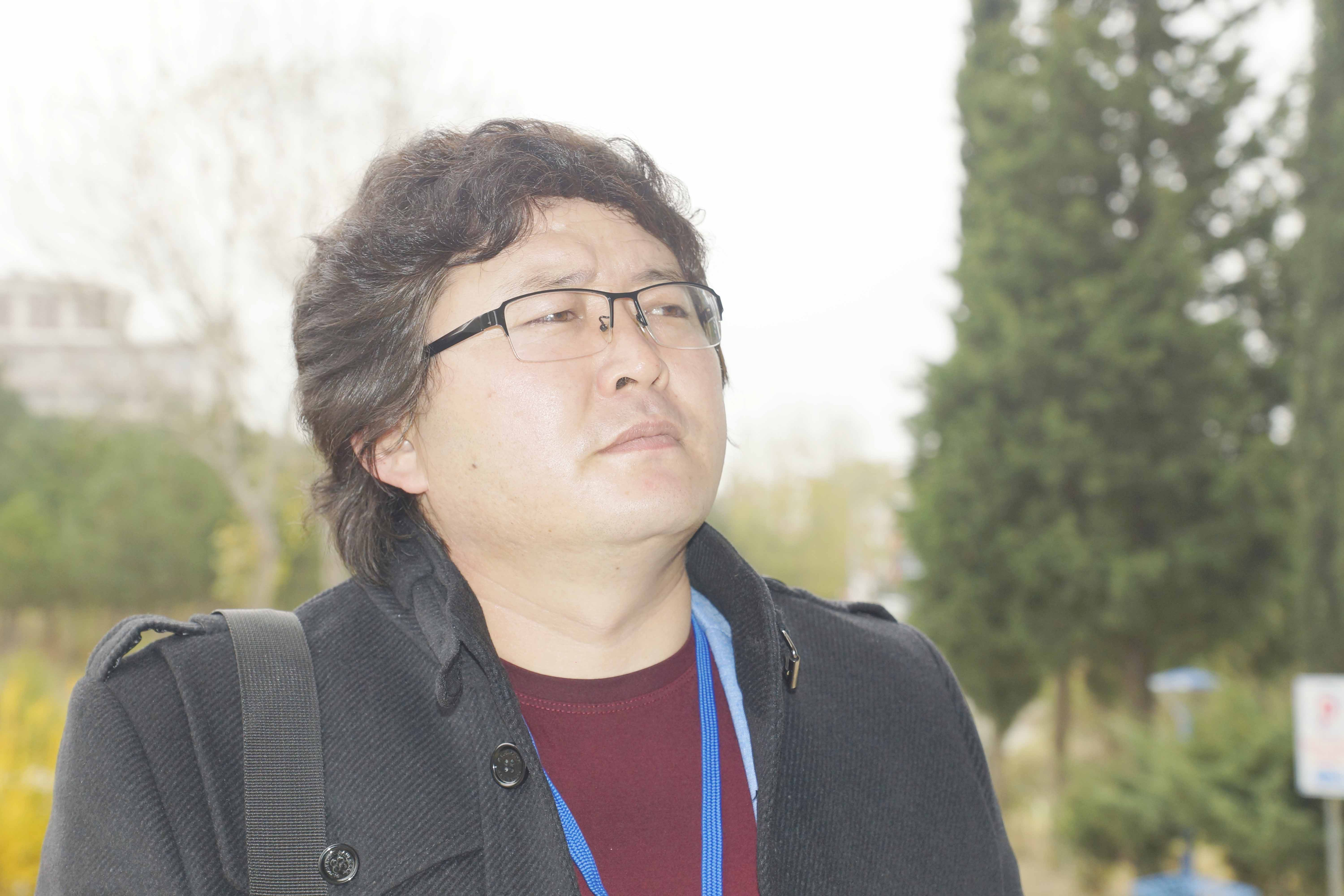 Bauyrzhan Karagyzuly